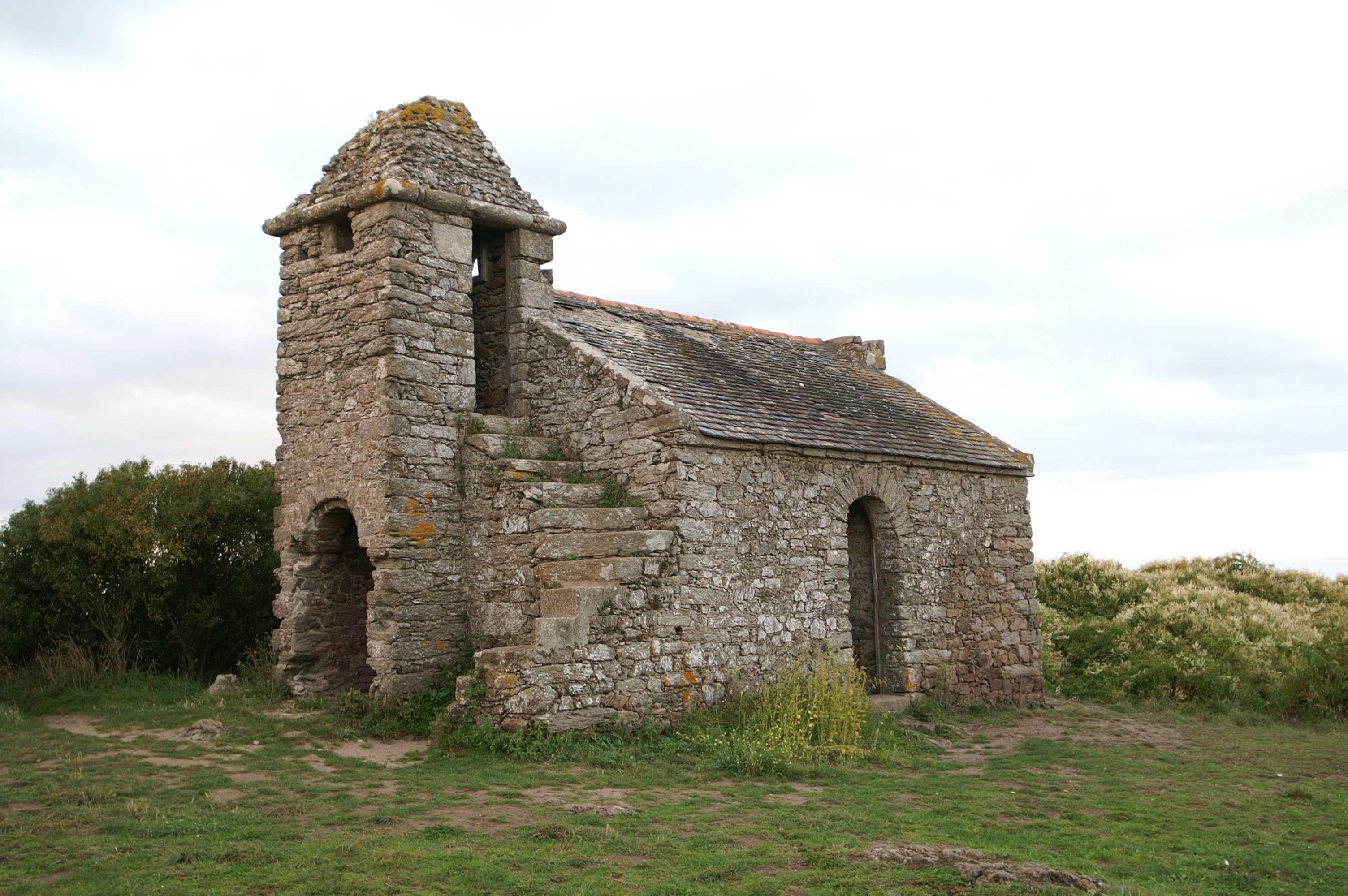 L'ancien corps de garde des Daules à Cancale.